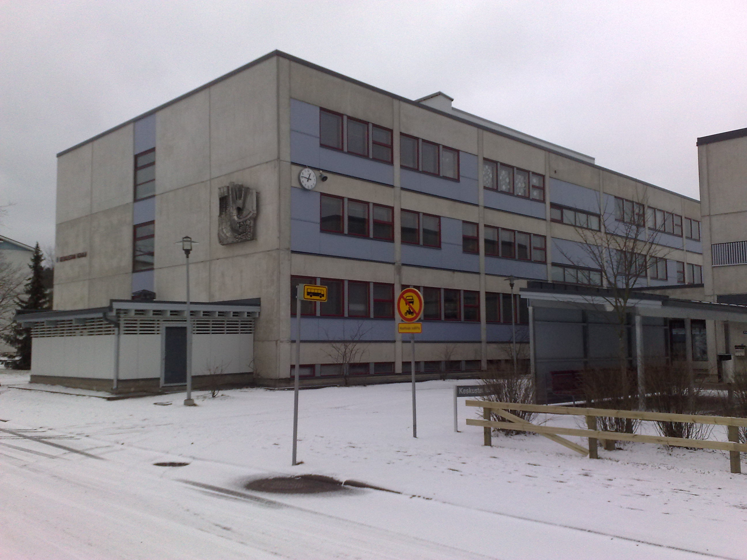 Keskustan koulu Salossa